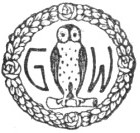 logo wydawnictwa GEBETHNERA I WOLFFA